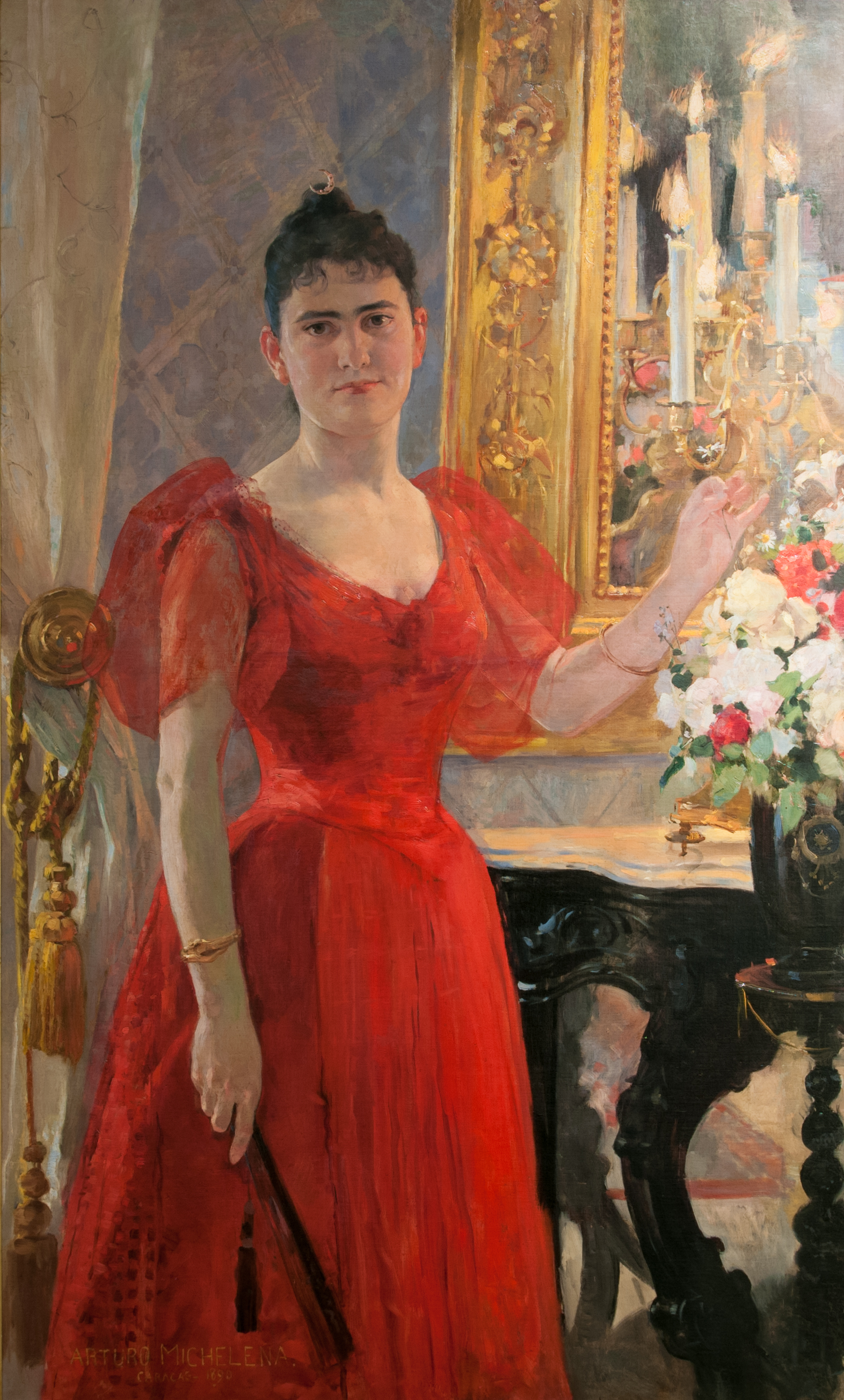 Lastenia Tello de Michelena. 1890. Oleo sobre tela. 135,1 x 92 cm. Museo Arturo Michelena. 1963.